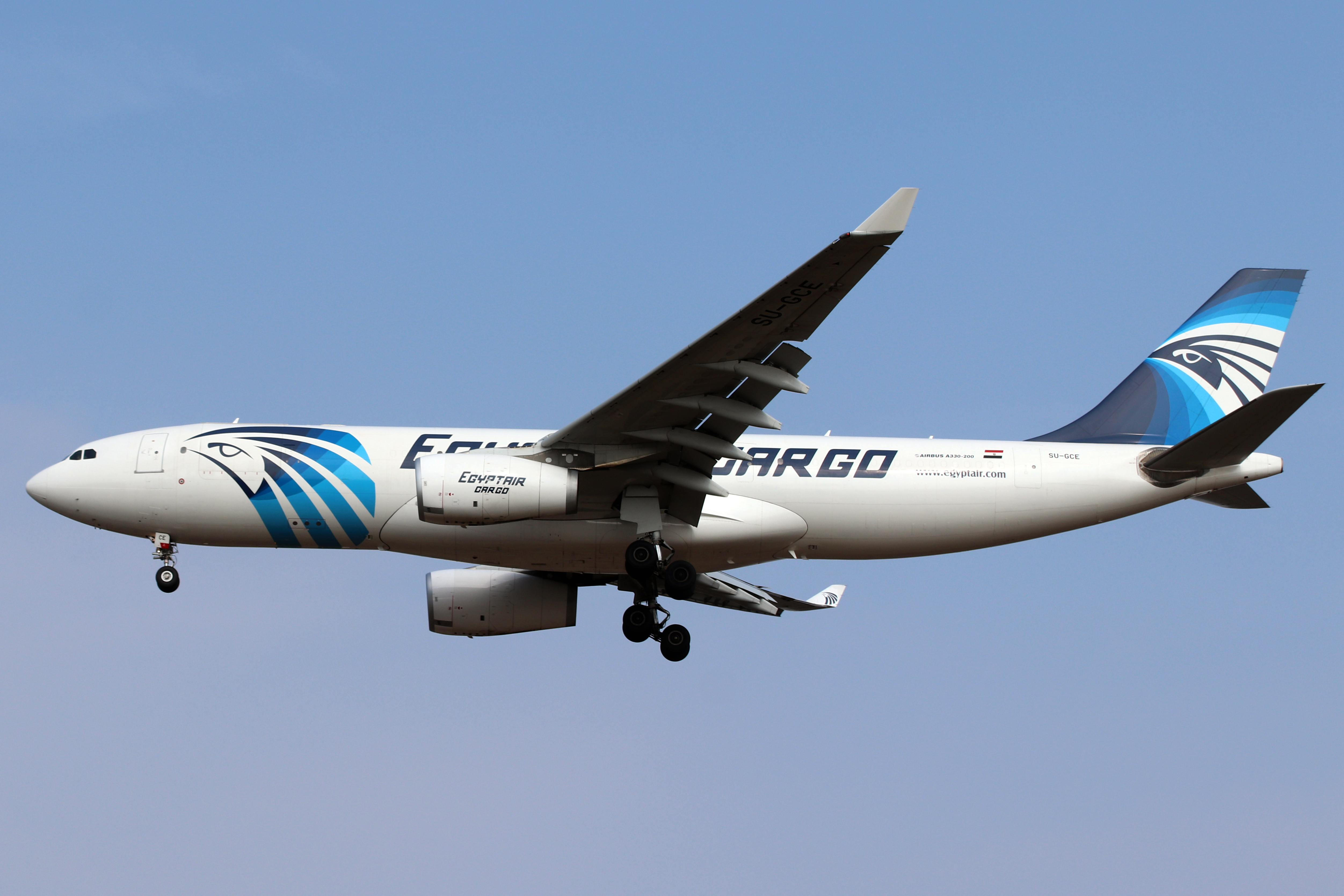 Flughafen Köln/Bonn